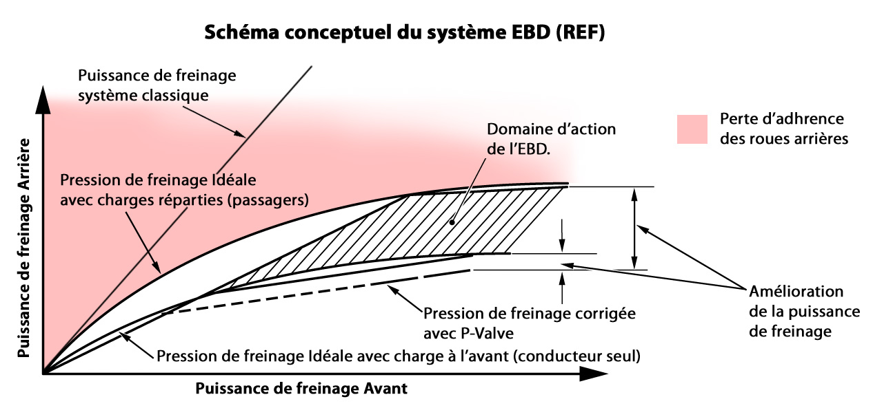 Schema conceptual d'action de l'EBD, répartiteur électronique de la puissance de freinage (REF).